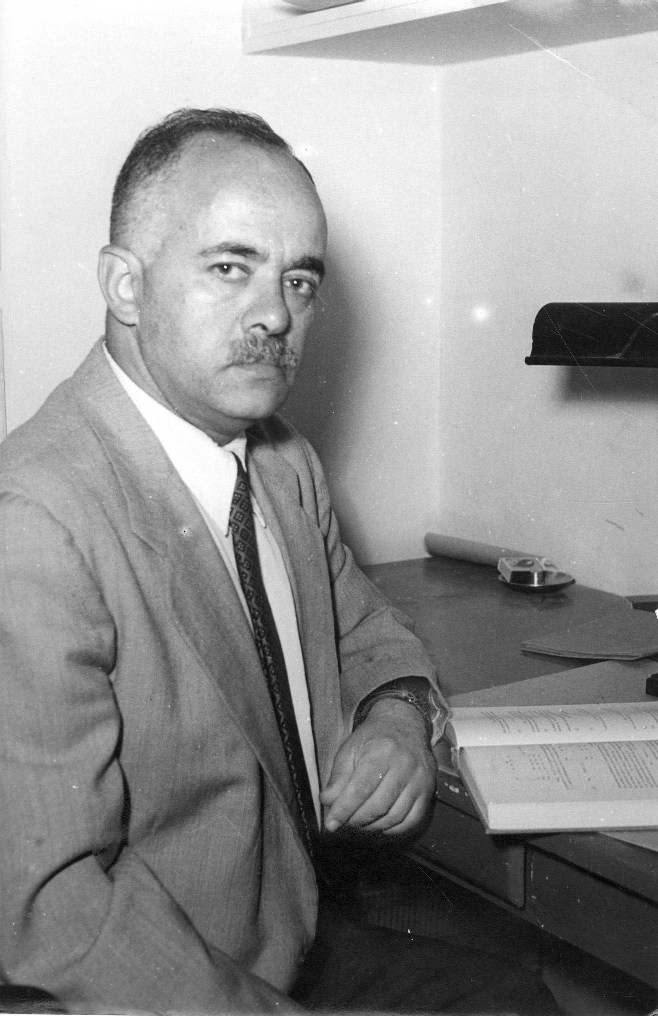 ערי ז'בוטינסקי